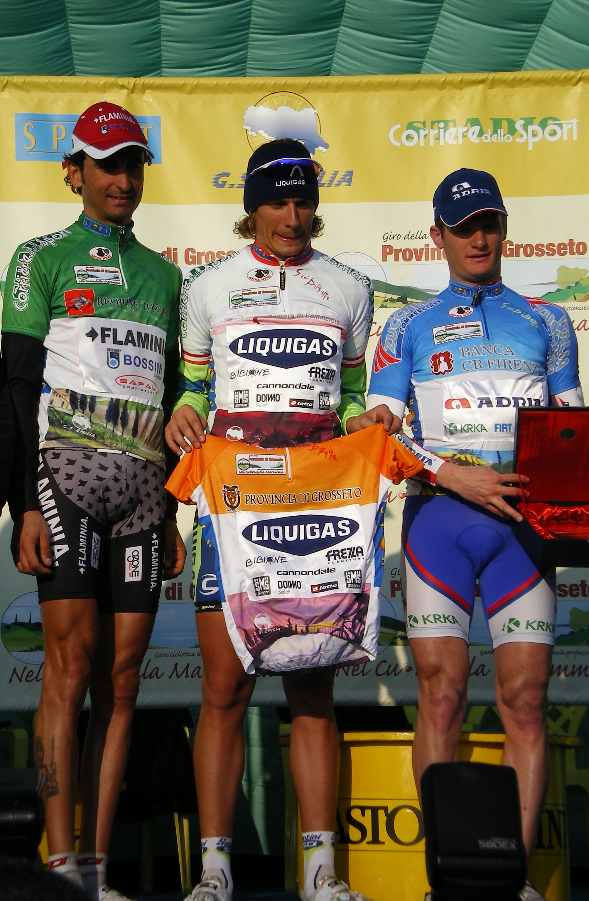 Filippo Pozzato sul Podio di Follonica alla prima tappa del Giro della Provincia di Grosseto 2008